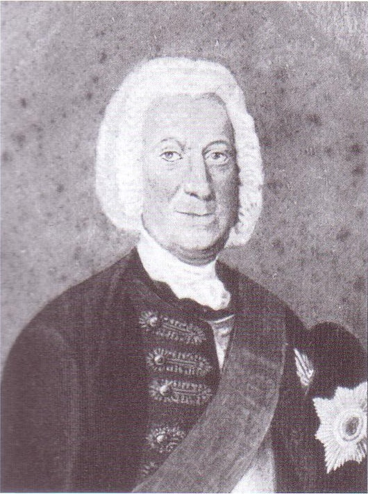 Portrait of Adam Christoph von Flanß (1664-1748)